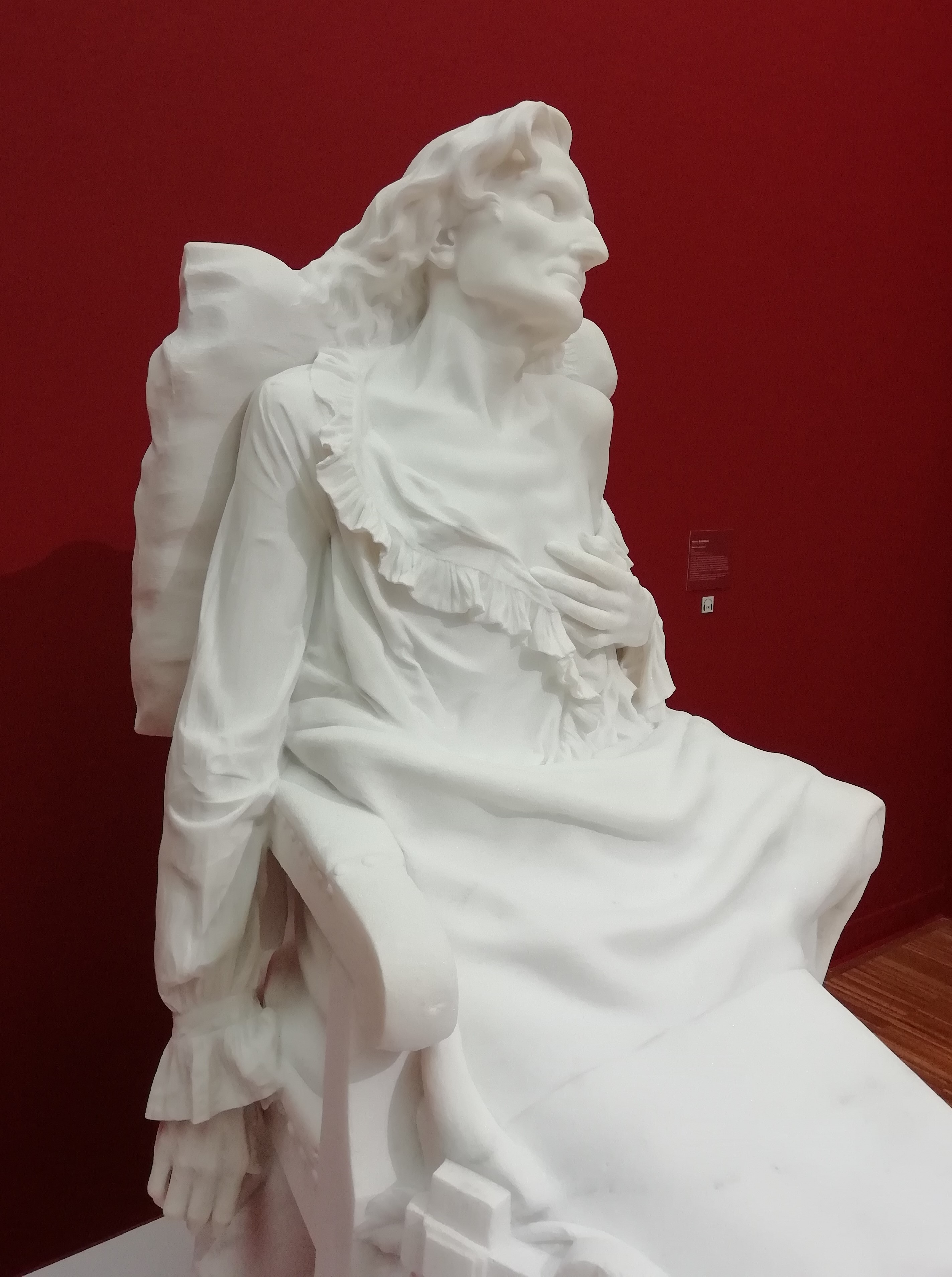 Pierre Rambaud, Berlioz mourant, marbre. Sujet : Hector Berlioz (1803-1869). Artiste : Joseph Pierre Rambaud, (Allevard, 1852 - Paris, 1893). Dernières années du 19e siècle. (Salon, 1894, après la mort de l’artiste ; le modèle en plâtre a été exposé en 1892). Photo prise durant l'Exposition temporaire "Grenoble et ses artistes au XIXe siècle" au Musée de Grenoble. Comme expliqué par Guy Tosatto, cette statue en marbre à été restaurée pour l'occasion.